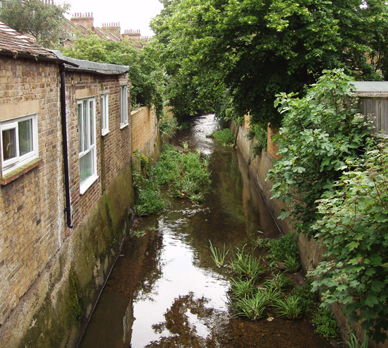 Река Квогги пересекает нулевой (Гринвичский) меридиан в районе Стэплхерст-роуд, Лондон.